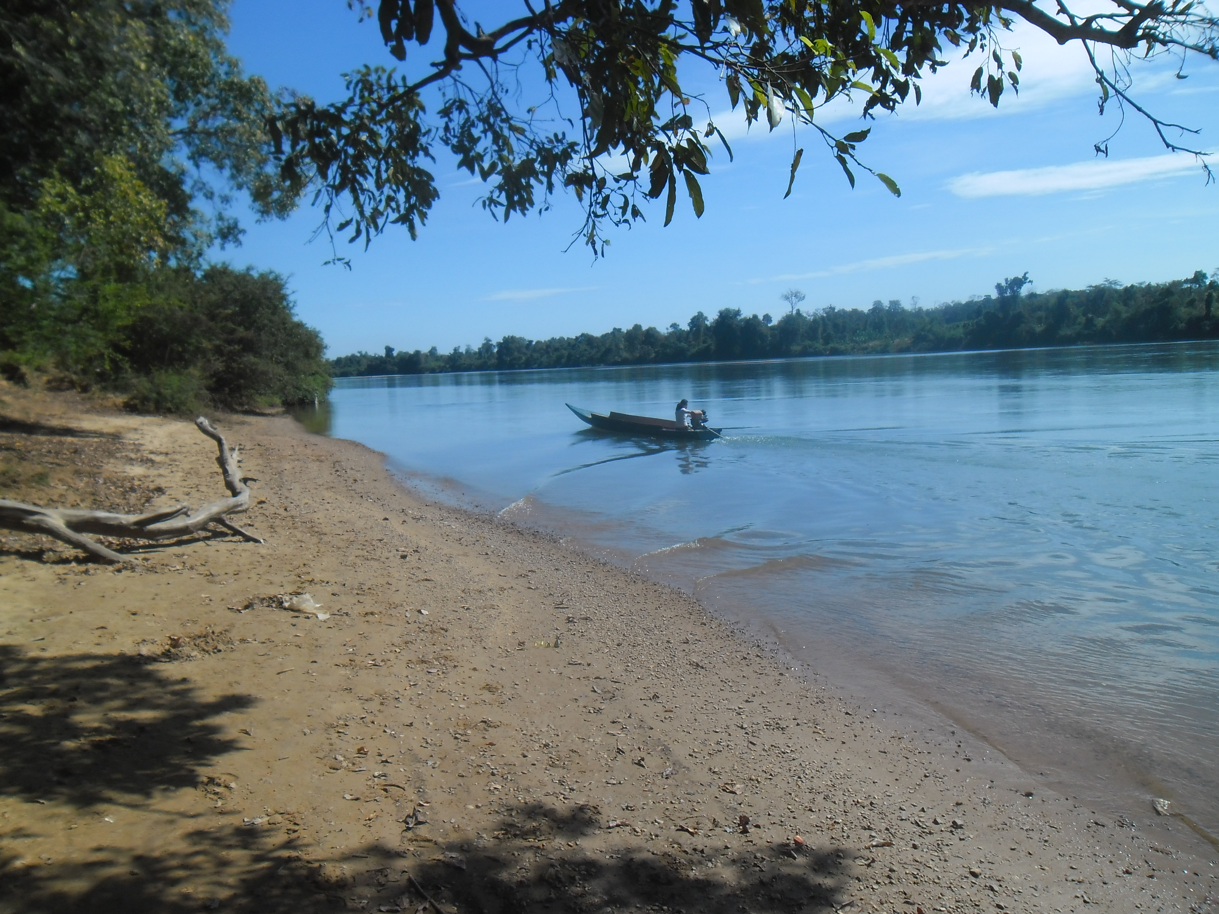 Tonlé San